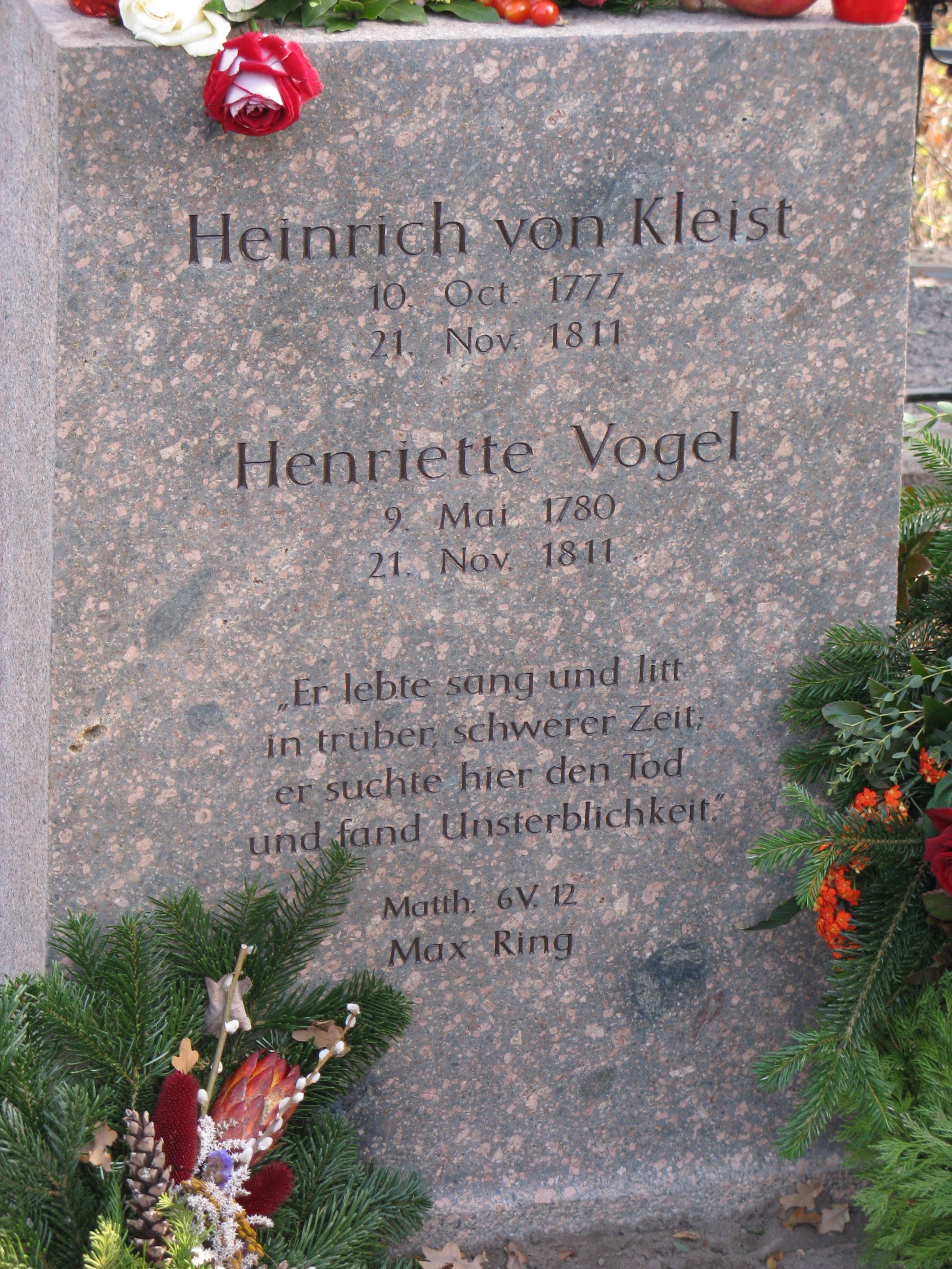 Dies ist die neue Seite des Grabsteins am Wannsee zum 200. Todestag